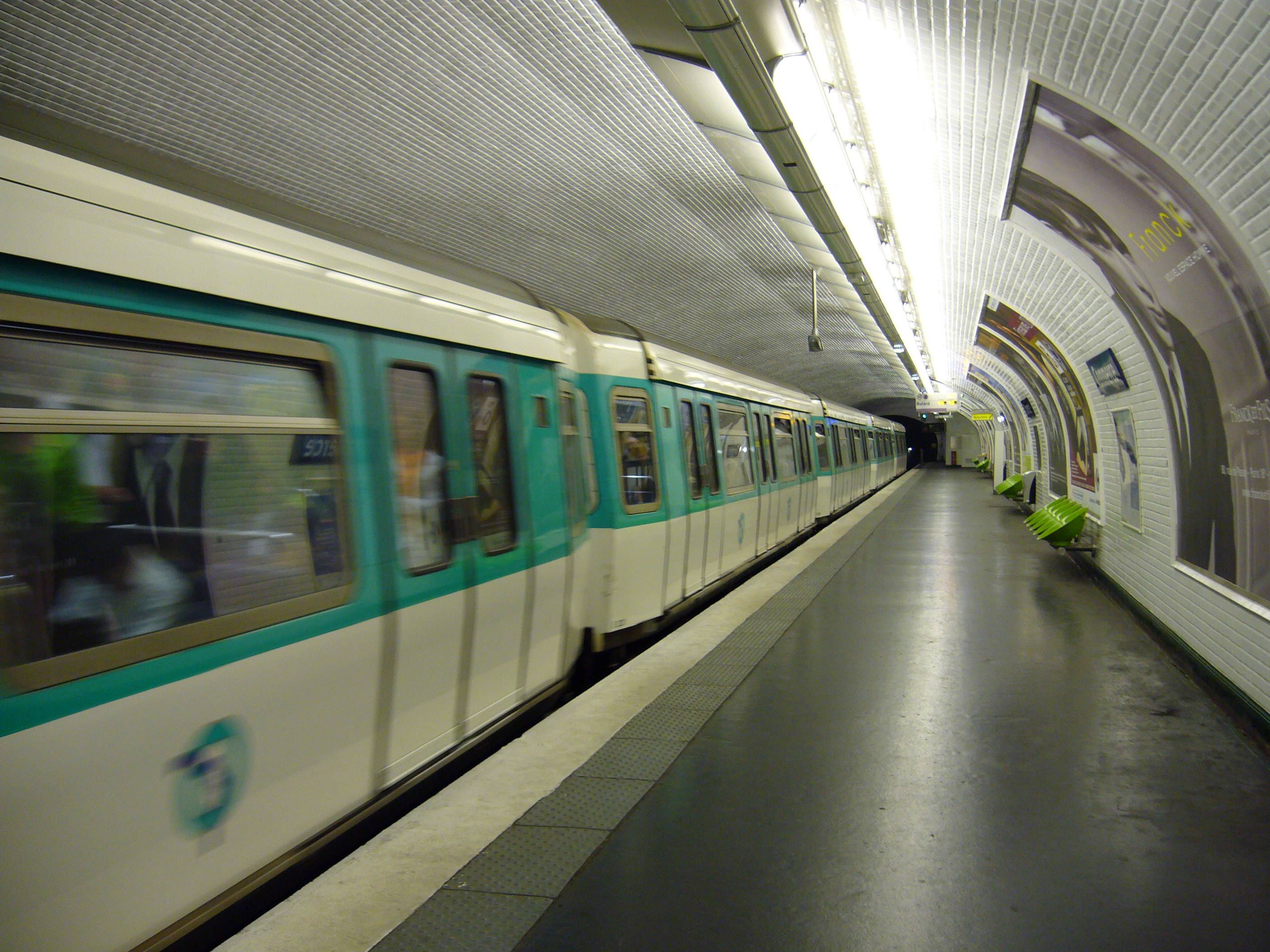 Quai décalé de la station Commerce sur la ligne 8 du métro parisien.